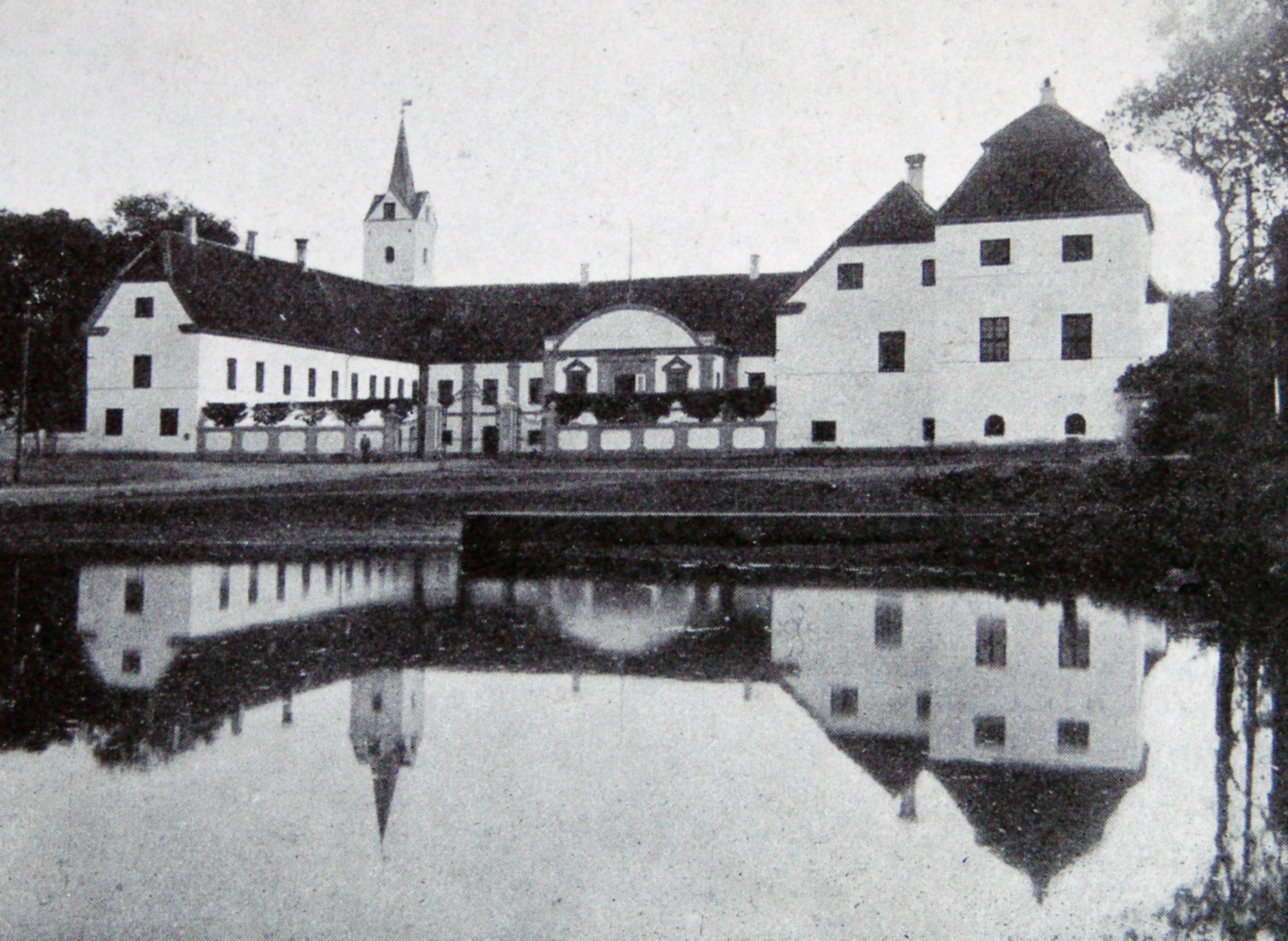 Dronninglund Slot set fra nord; Det er en herregård der ligger i den østlige del af Vendsyssel, i Dronninglund Sogn (indtil Kommunalreformen i 1970 lå det i Dronninglund Herred, Hjørring Amt); nu er det i Brønderslev Kommune og hører under Region Nordjylland.